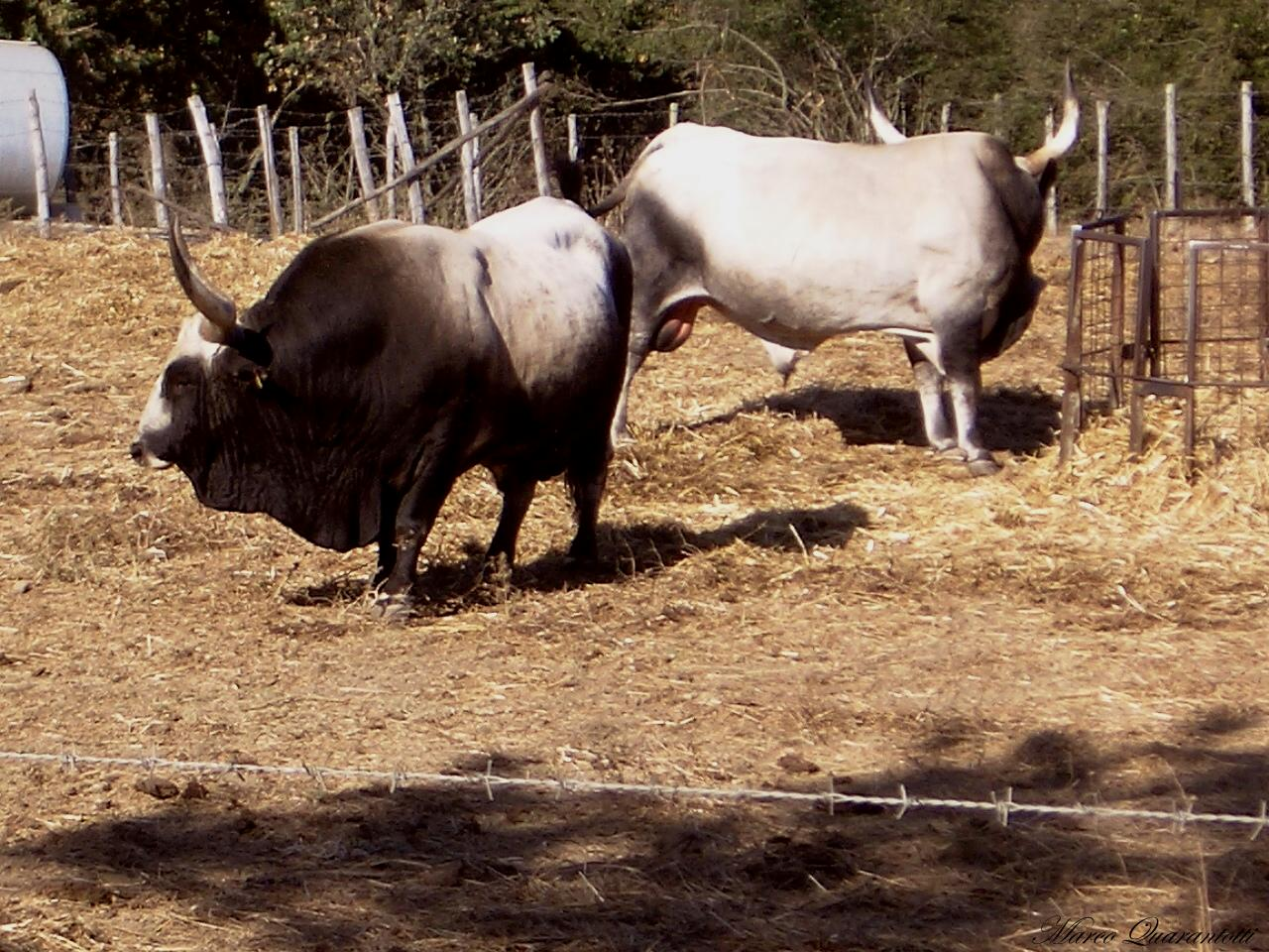 TORI MAREMMANI